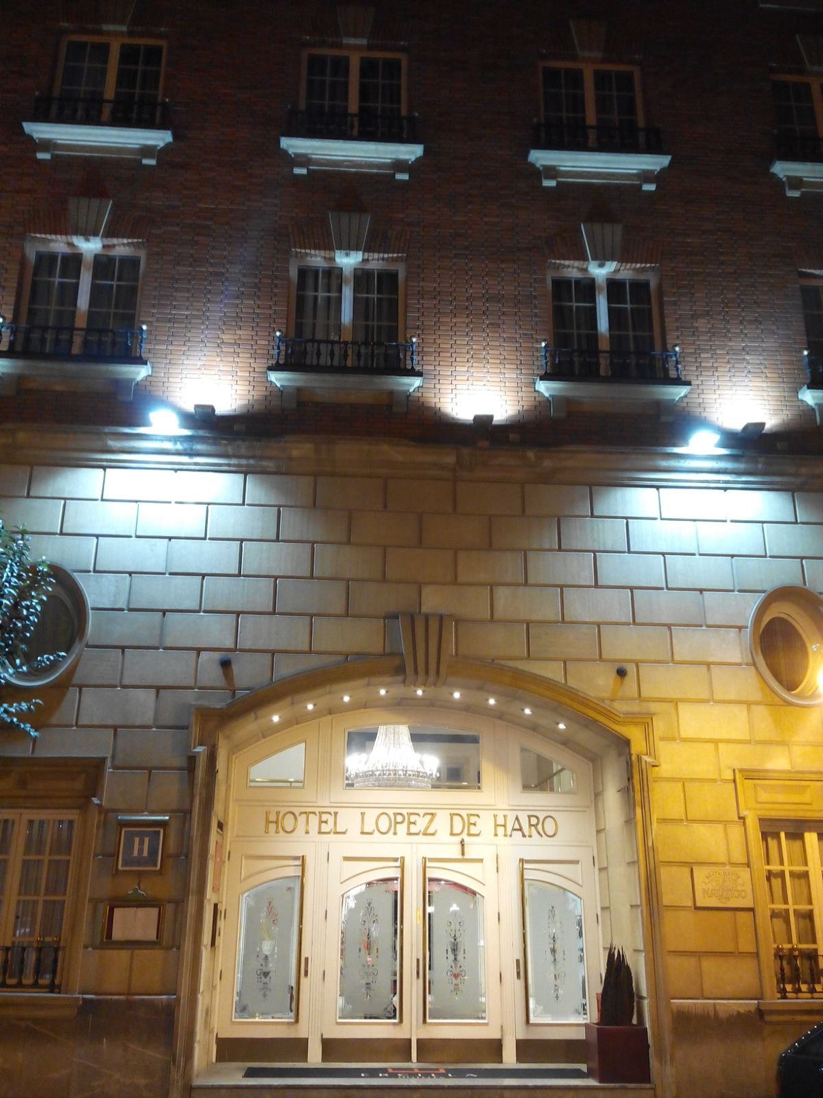 Hotel López de Haro en Bilbao.